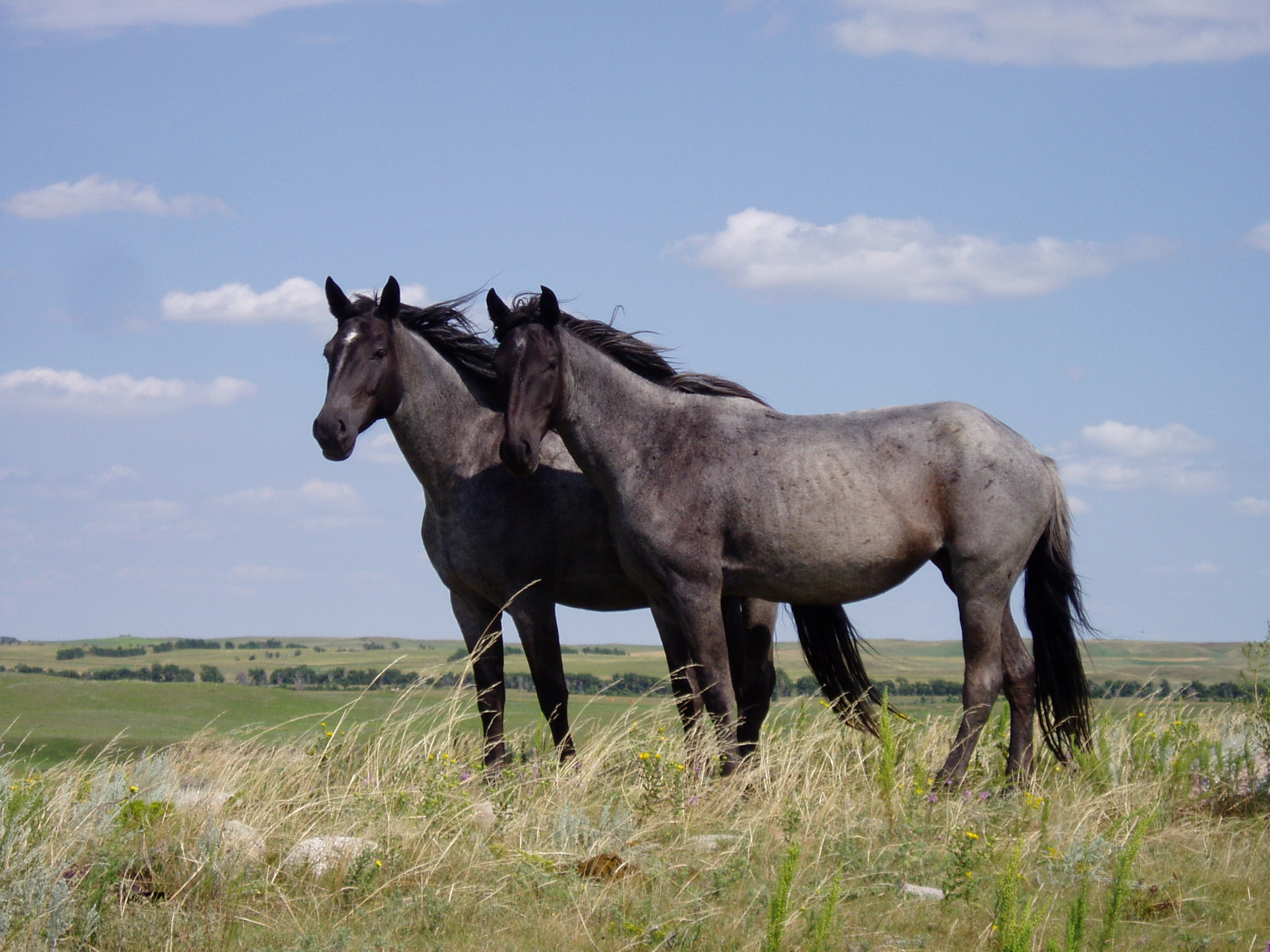 Two young Nokota mares